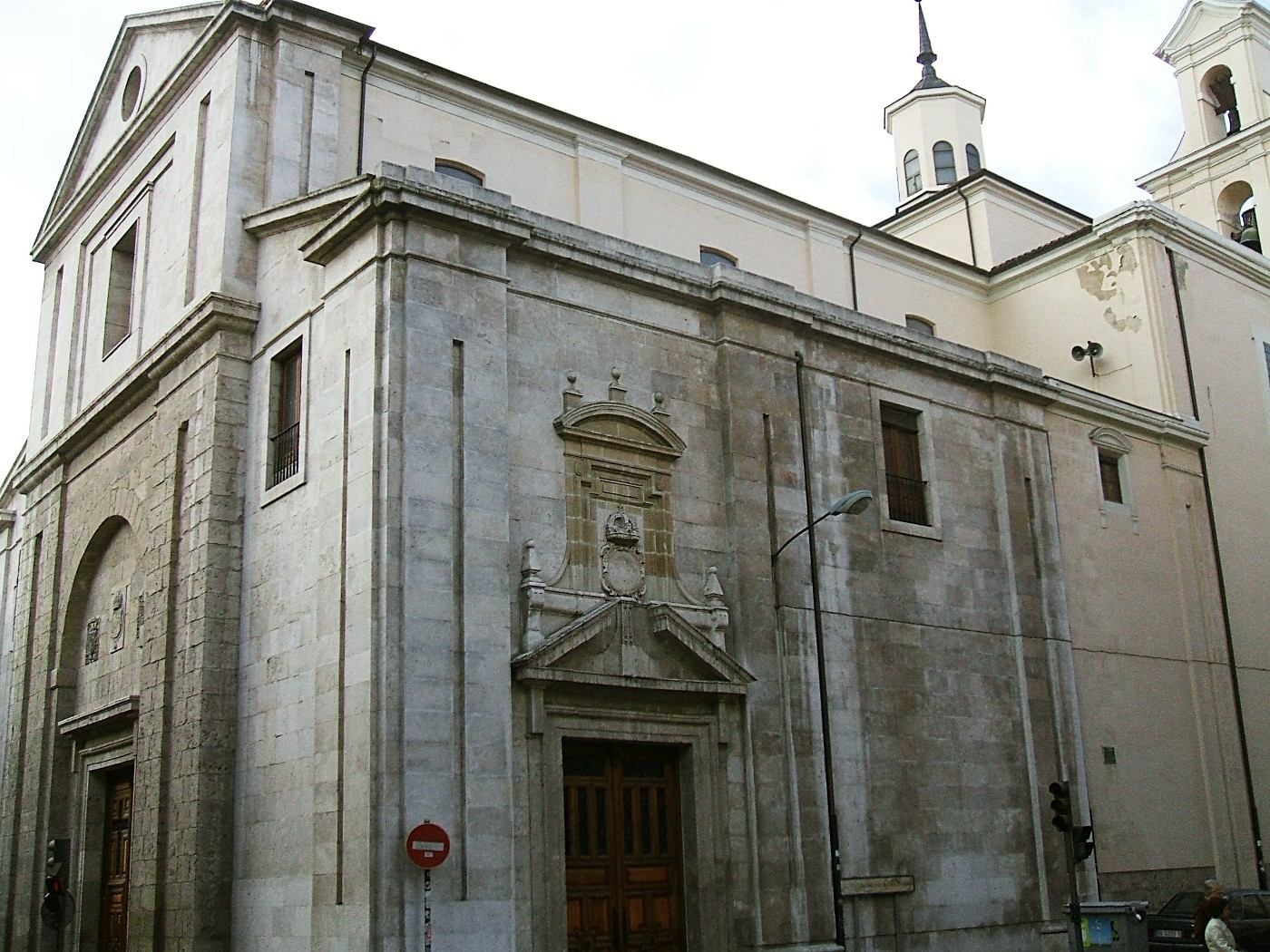 Basílica Menor y Santuario Nacional de la Gran Promesa, en Valladolid, España/Spain